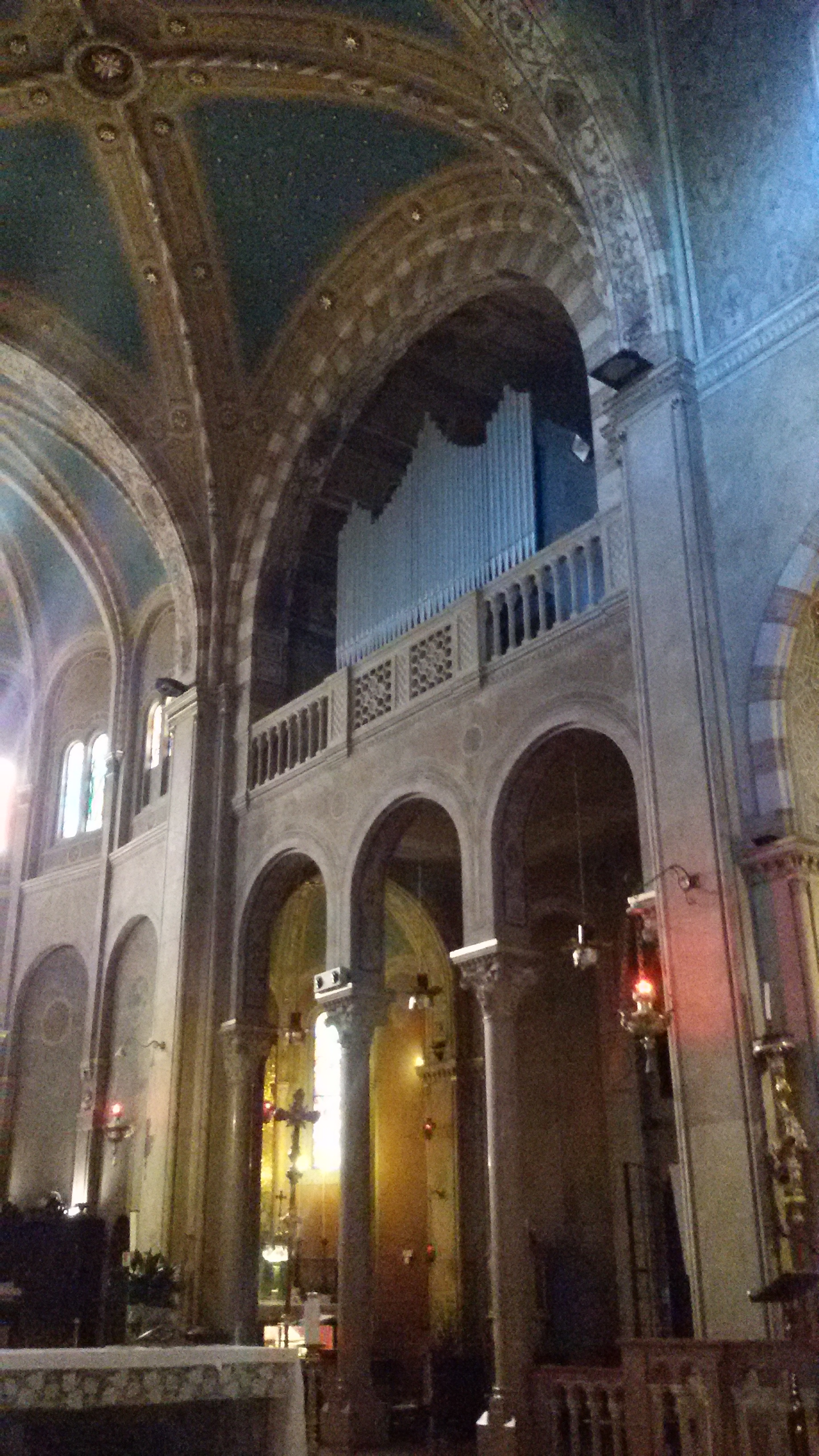 Chiesa di Santa Cristina Quinto di Treviso